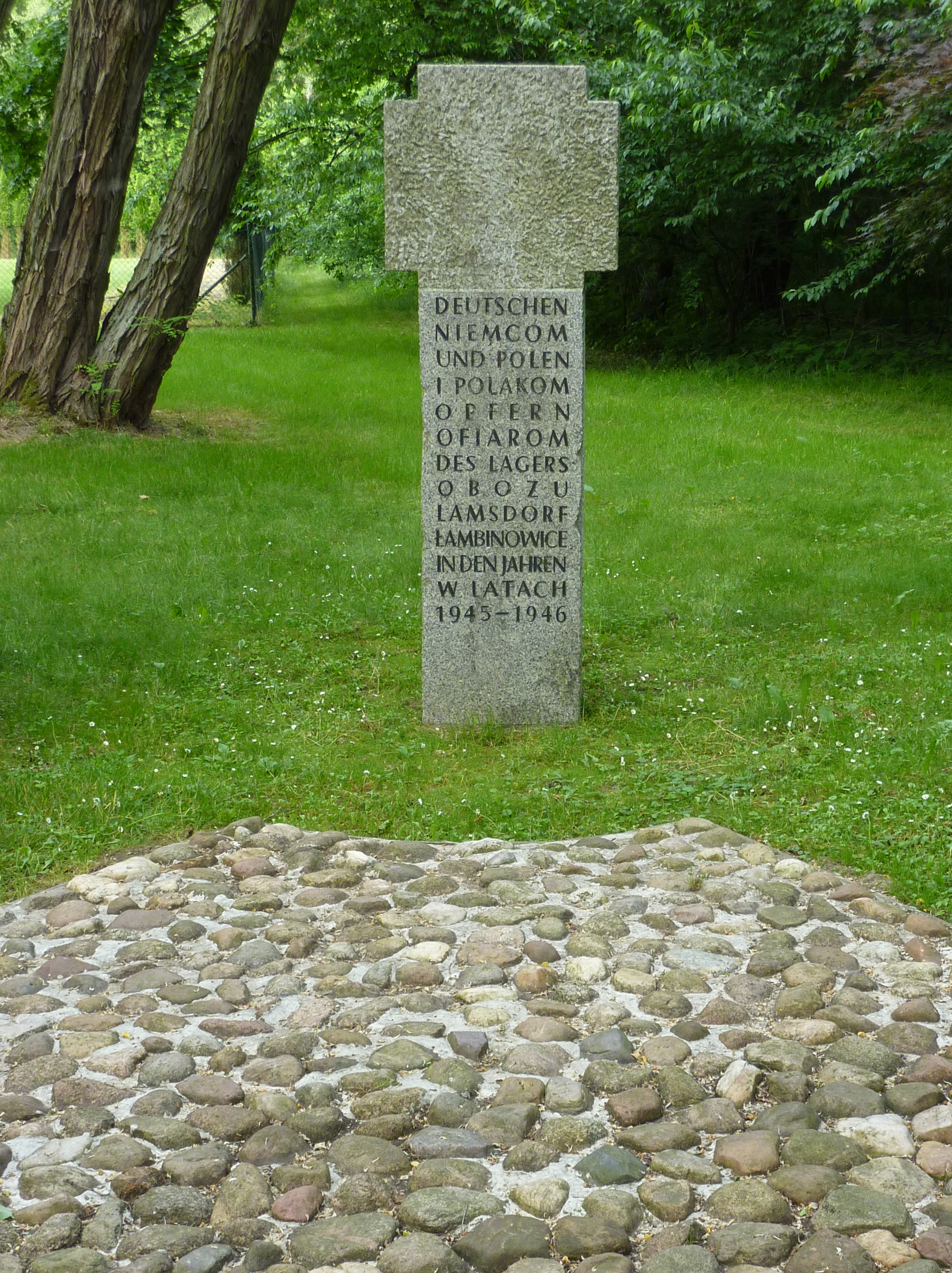 Krzyż pomnik na terenie obozu pracy w Łambinowicach